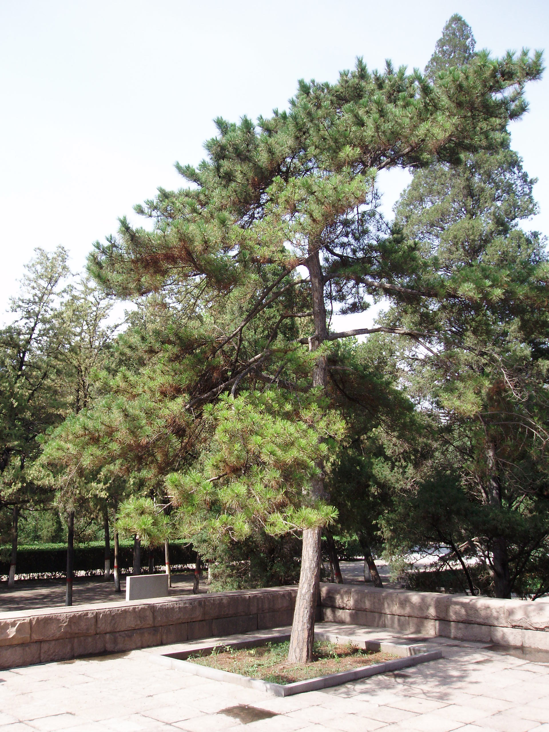 Chinese hard pine Pinus tabuliformis